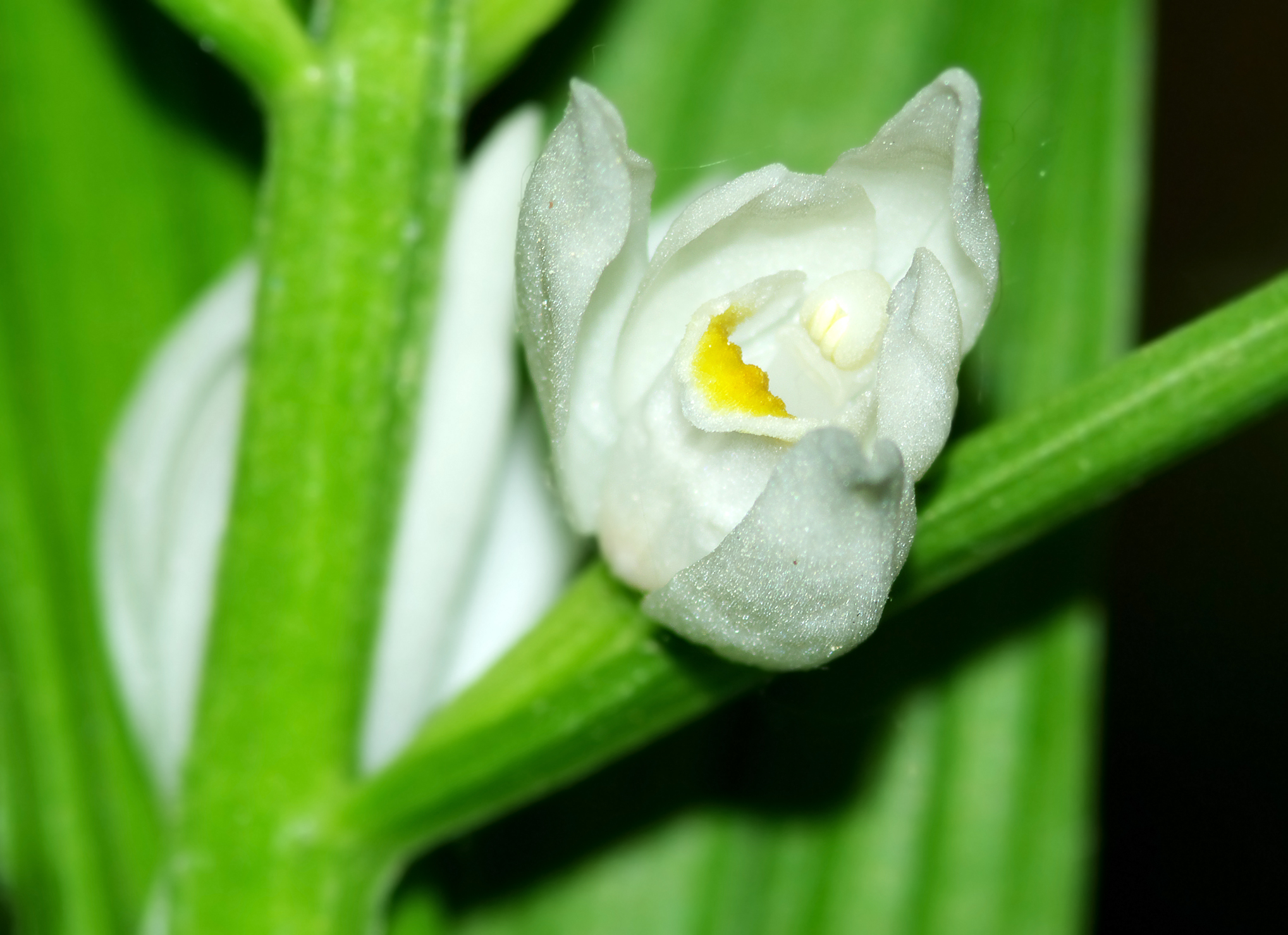 Buławnik mieczolistny (Cephalanthera longifolia) / Bukowa Góra / Dąbrowa Górnicza